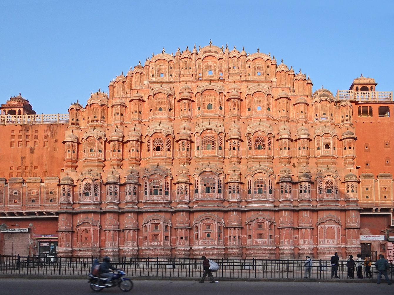 Vue d'ensemble du célèbre Hawa Mahal (Palais des vents) Cet édifice de cinq étages a été réalisé en 1799 sous le règne de Pratap Singh. Sa façade est composée de loges en saillie couvertes d'un petit demi-dôme et dont les fenêtres sont, pour l'essentiel de leur surface, obturées par des écrans de pierre ajourée (jali). Ce système permettait aux femmes du harem de voir dans la rue sans être vues, comme le veut la tradition islamique que les rois rajpouts, alliés des empereurs moghols, appliquaient à la lettre.